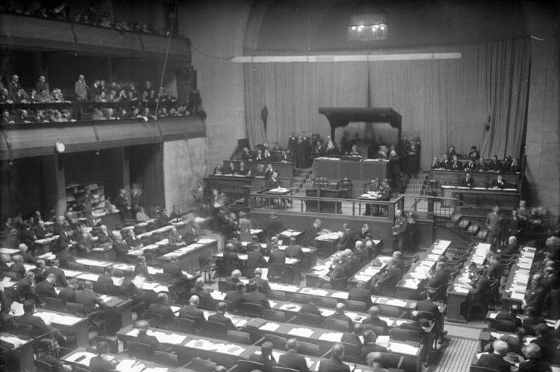 Parlamente aus aller Welt! Das Parlament der Völker. Blick in den Sitzungssaal des Völkerbundes in Genf. Information added by Wikimedia users.